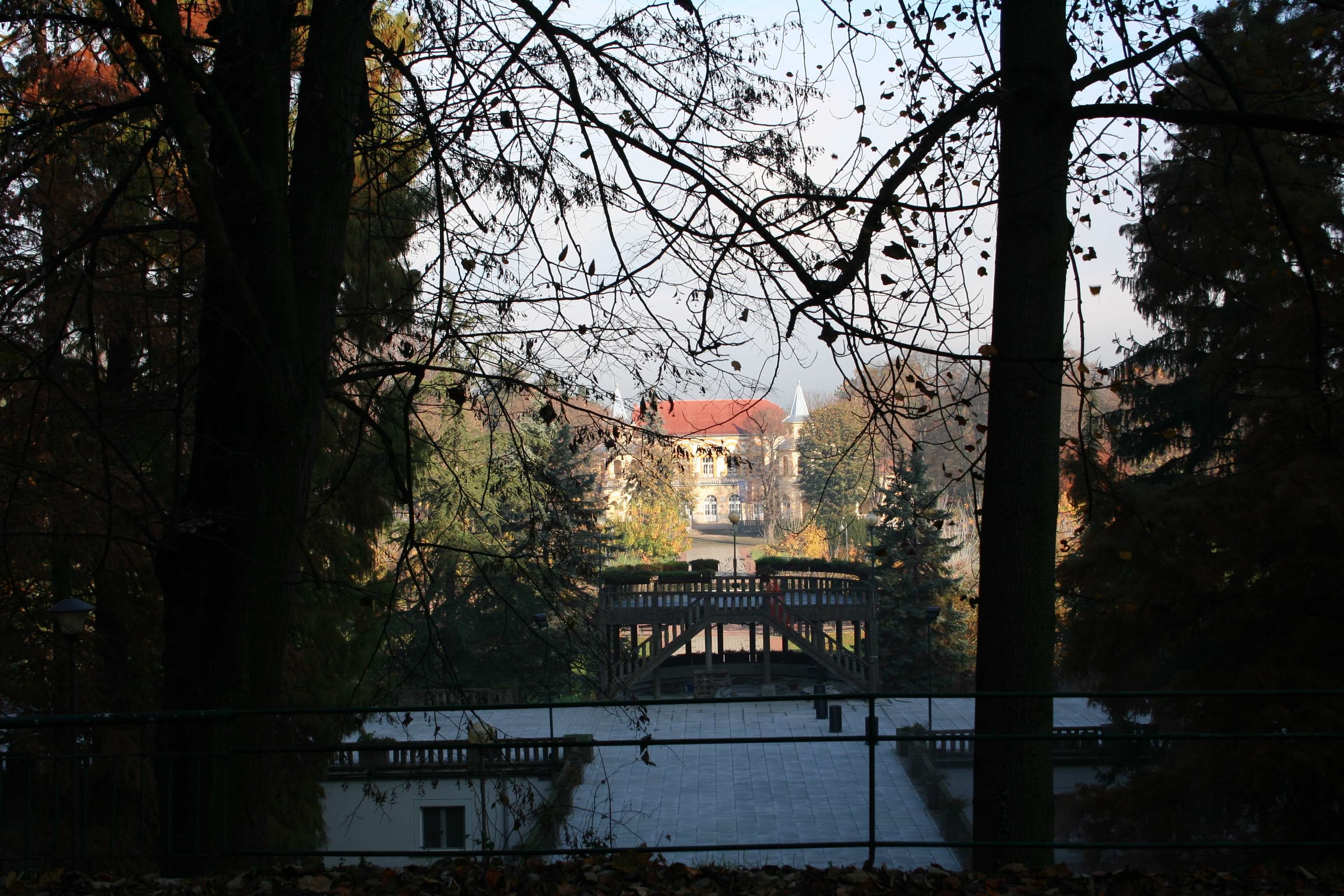 Banja Koviljača